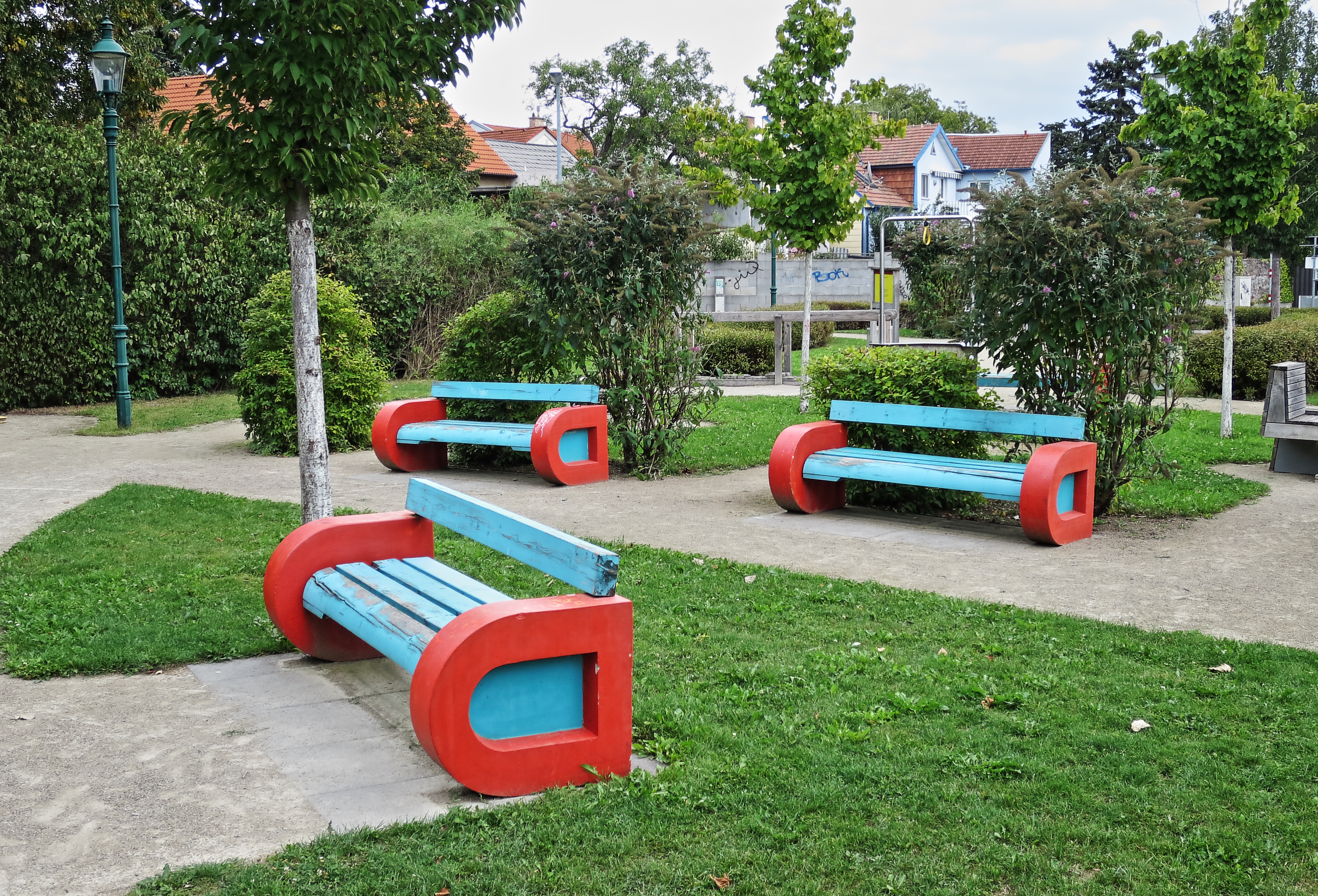 Jazzpark Essling in Wien-Donaustadt, Donaustadt-Bänke